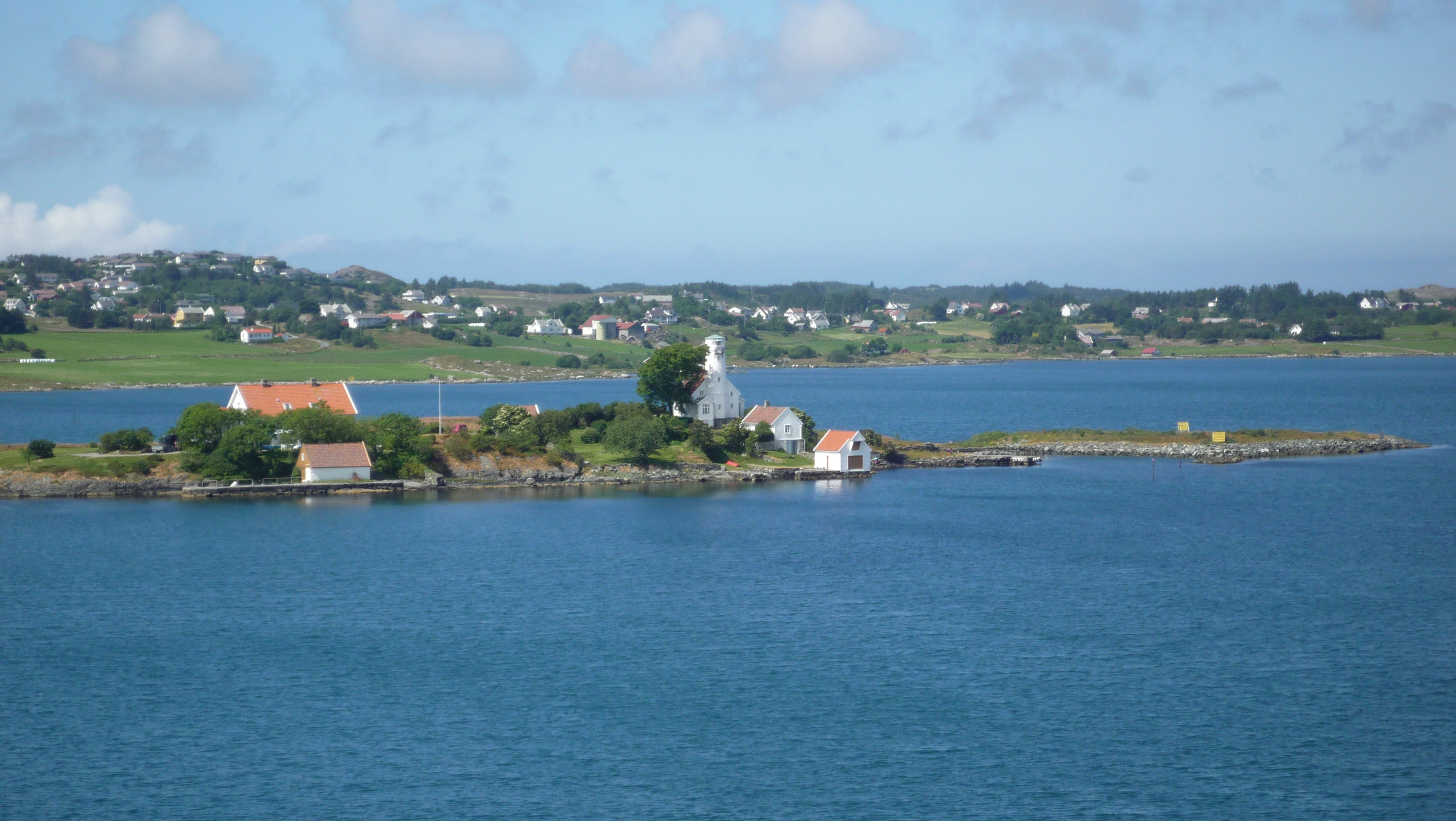 Høgevarde fyrstasjon ved Karmsundet